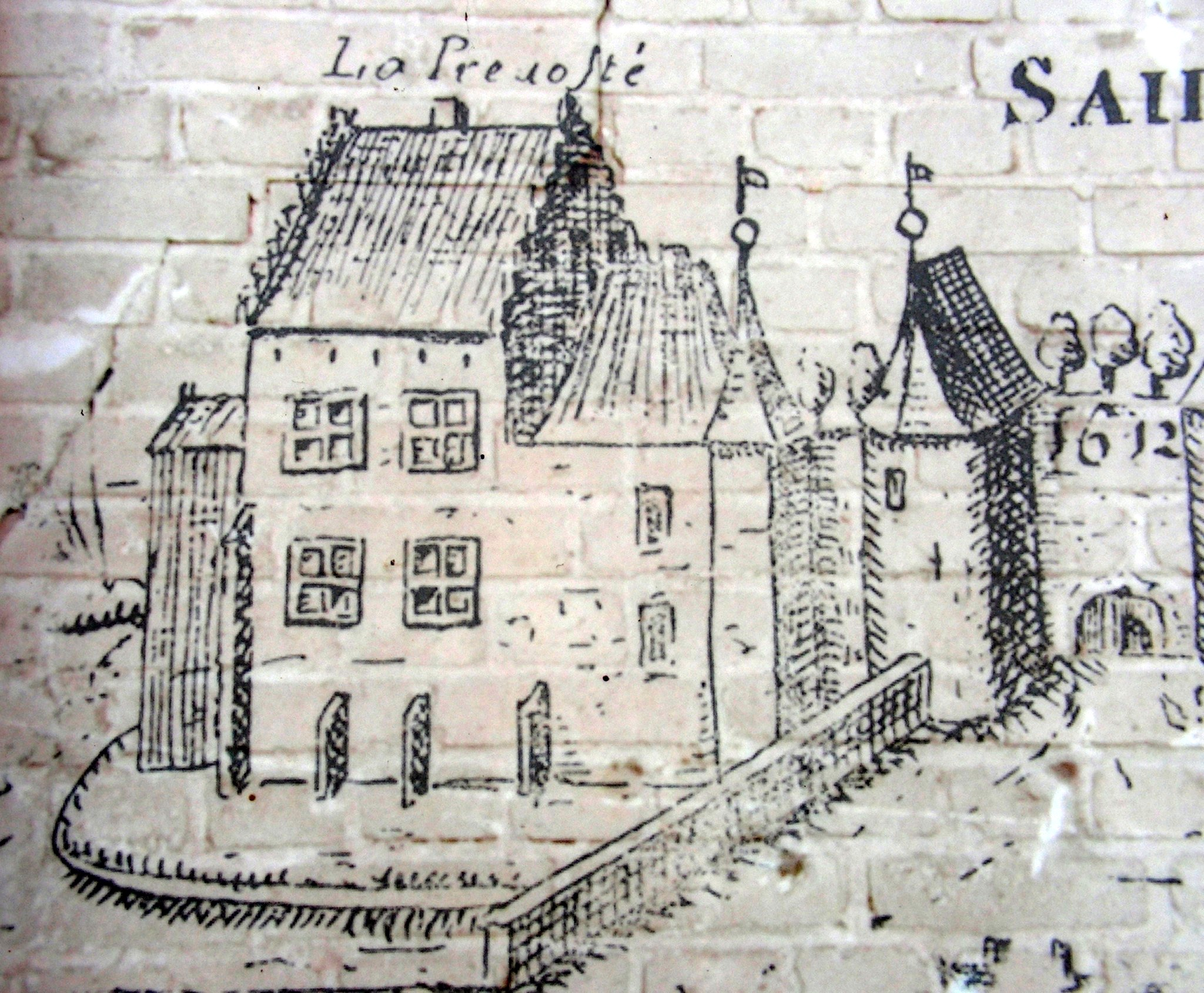 Illustration du panneau explicatif, tirée de "Flandria illustrata" de Sanderus, t.II, p.362 La Haye, 1726 .